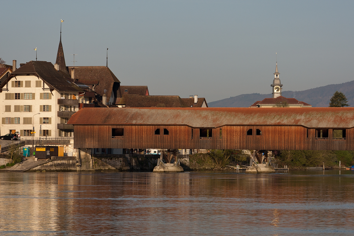 Holzbrücke über die Aare in Büren an der Aare. Mitarbeit von Johann Daniel Osterrieth (* 9. Oktober 1768 in Straßburg, Elsass; † 25. Juli 1839 in Bern) war ein Architekt des Klassizismus. Er war Berner Stadtbaumeister.